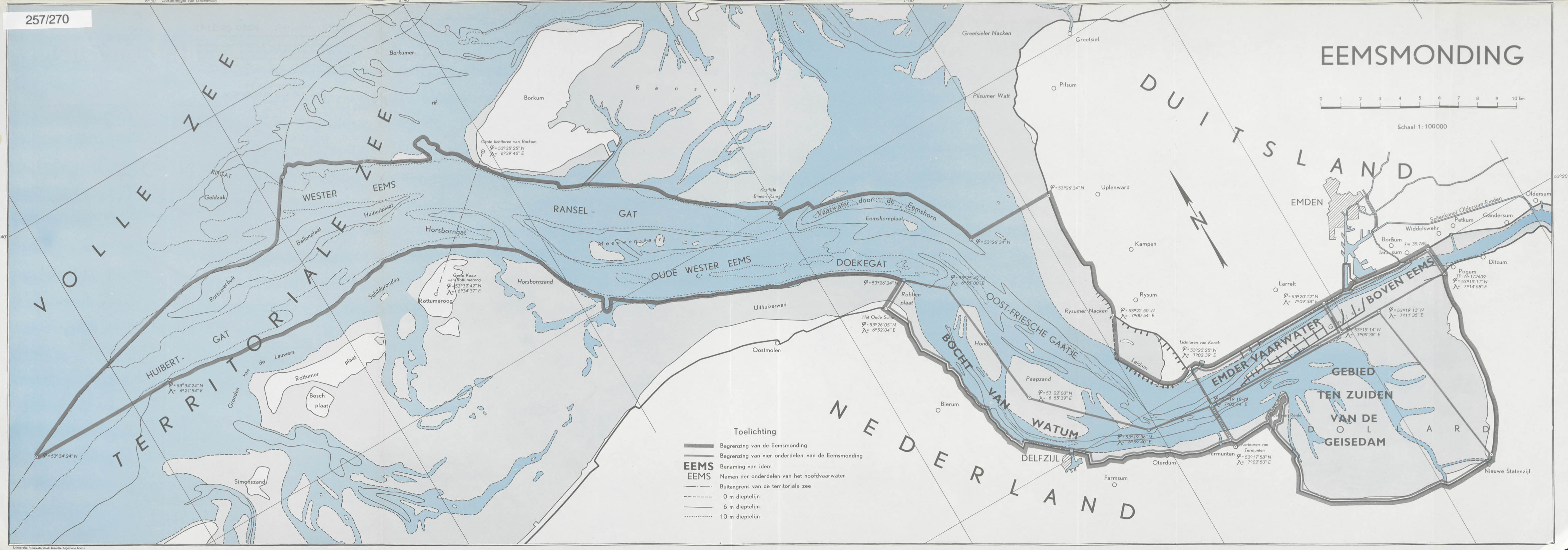 De kaart geeft de begrenzingen van de Eemsmonding weer, zoals vastgesteld in het Eems-Dollard Verdrag